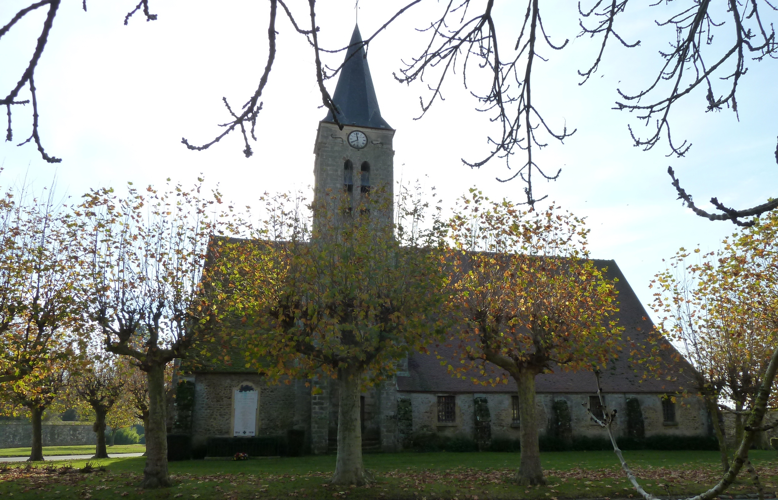 L'église de la commune de Aubepierre, canton de Mormant, commune qui compte beaucoup de hameaux dispersés à travers champs. PA00086799